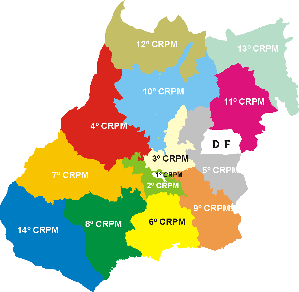 Comando regional da PM